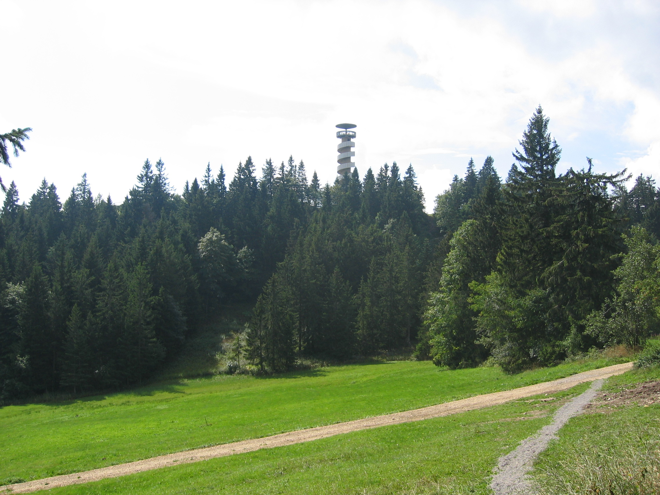 Tour de Moron vue depuis le nord.